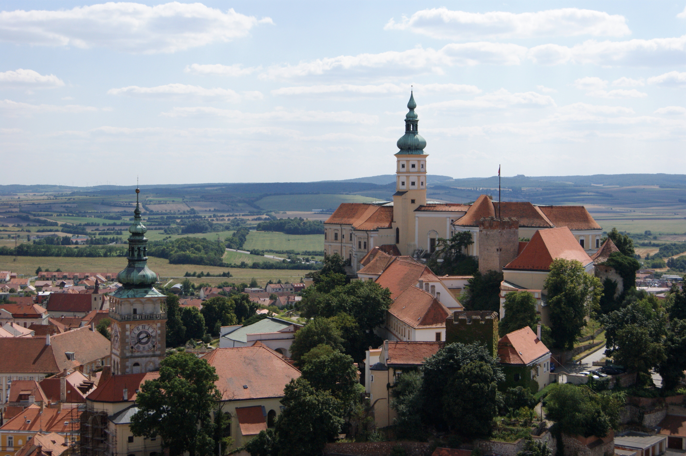 Zámek Mikulov, Zámek 1/4, Mikulov.